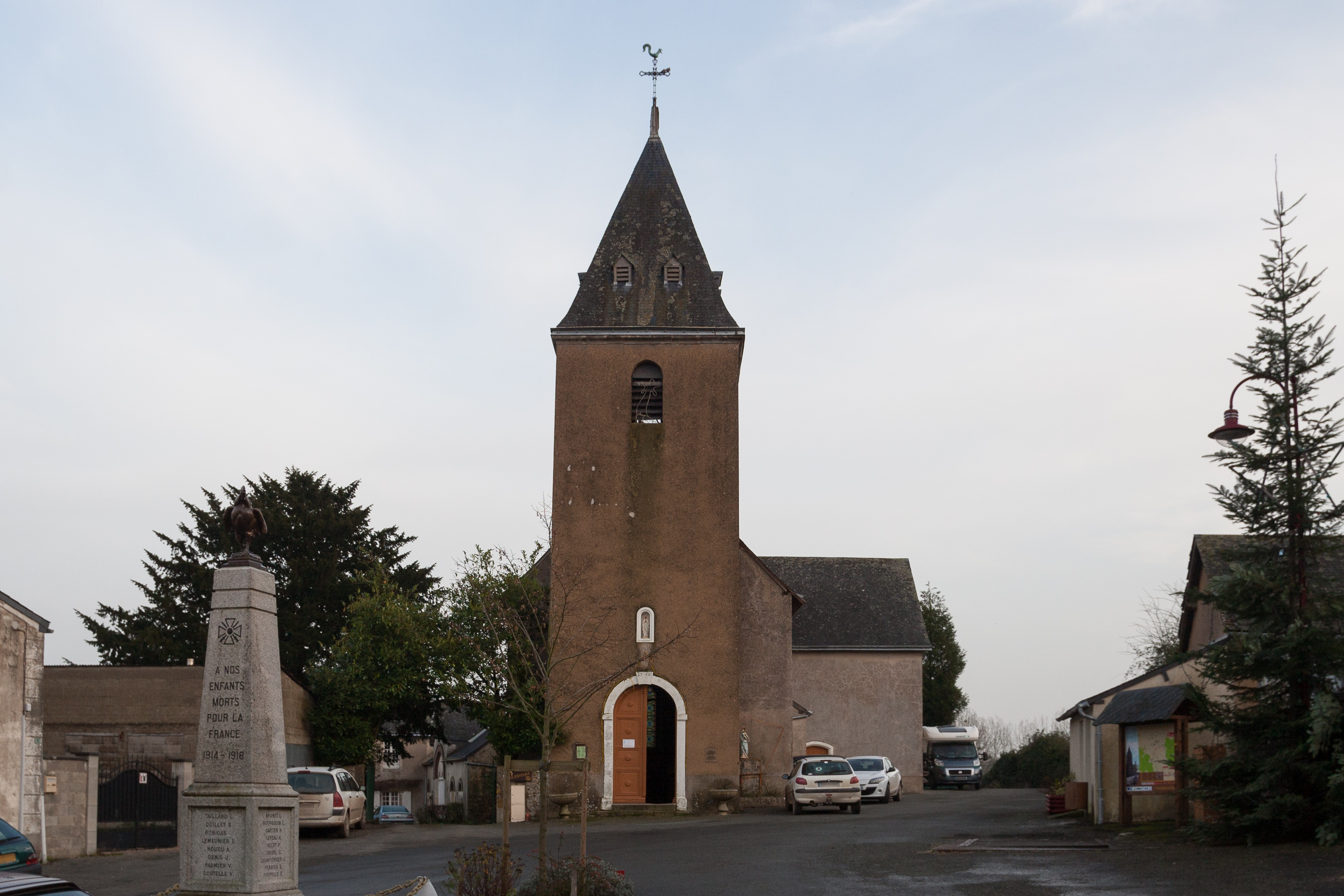 Église Saint-Gemme de Neuvillette-en-Charnie.